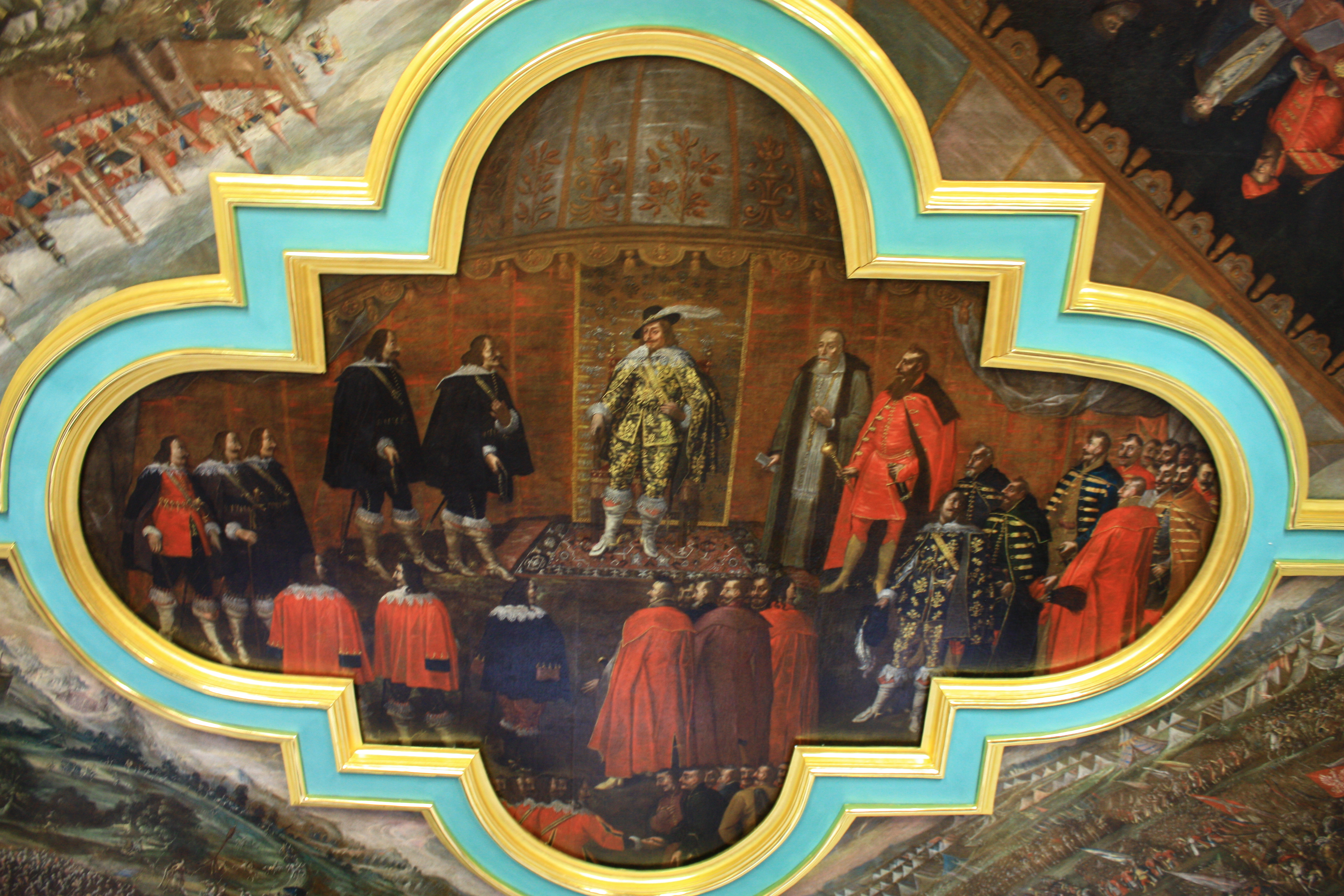 Kielce, pałac biskupi (ze skrzydłami), lata 1637-1641, skrzydła: 1720-1746 r.